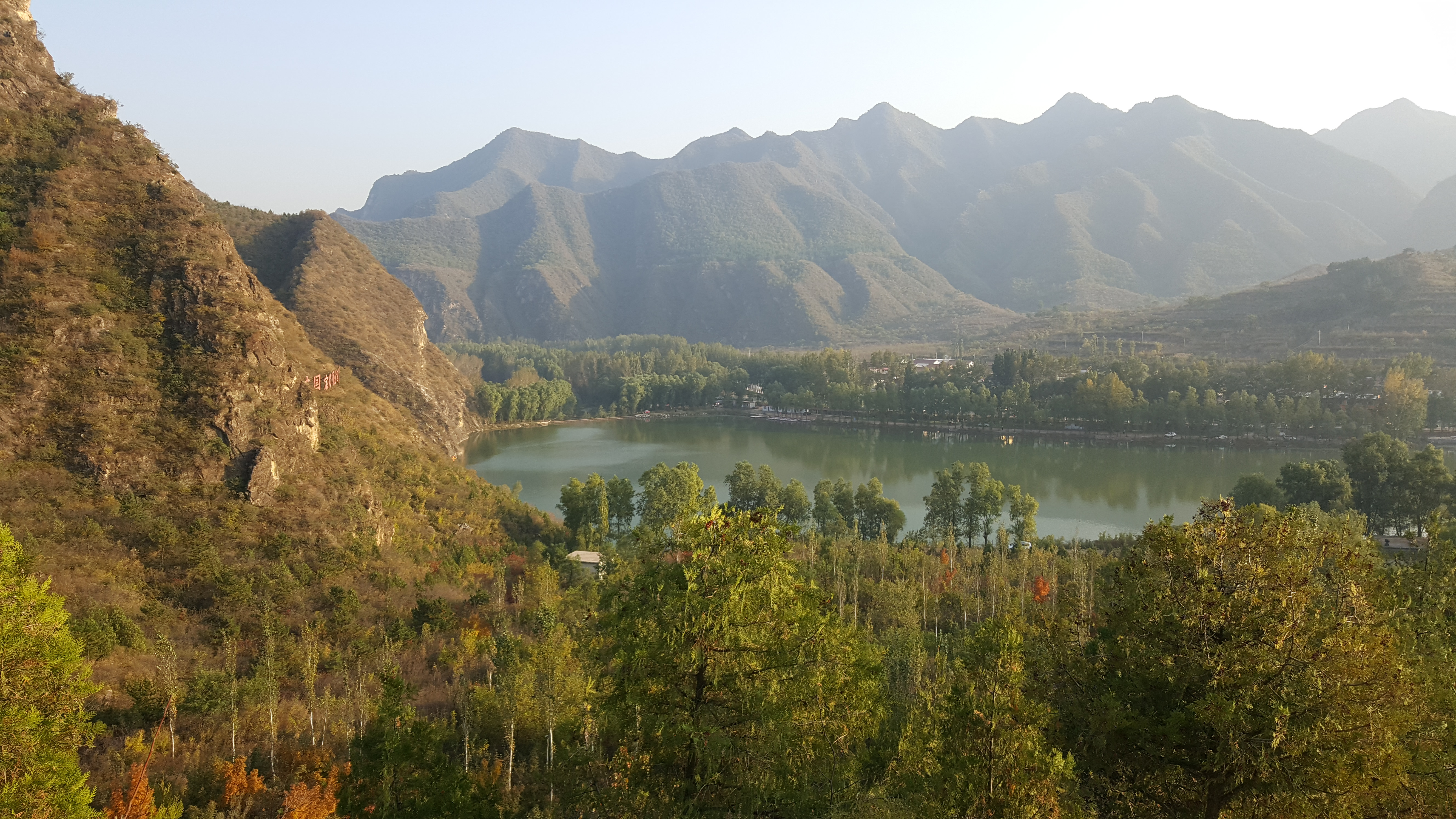 中文（中国大陆）: 延庆硅化木公园下的白河